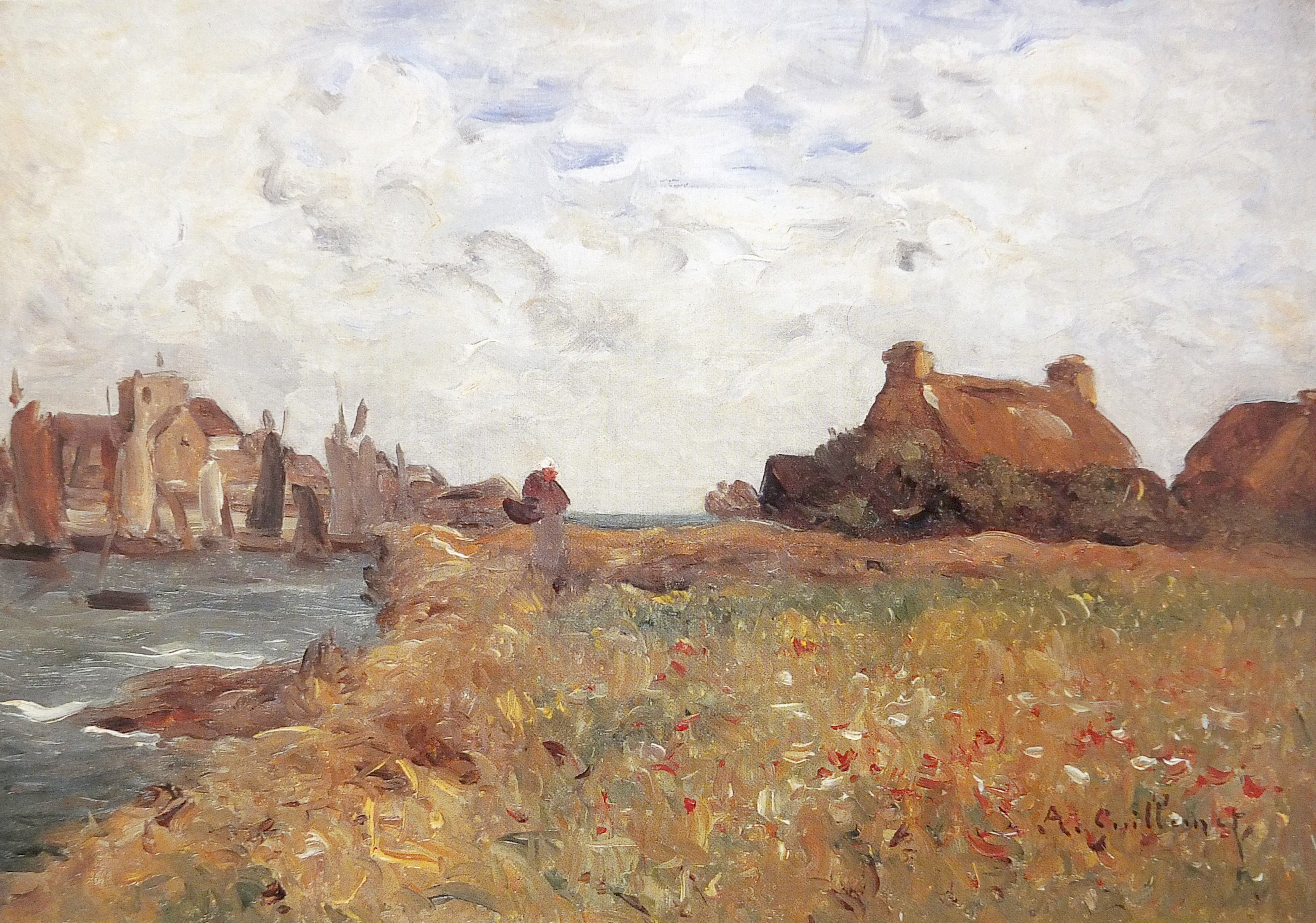 Le Port de Barfleur, huile sur toile de Jean-Baptiste Antoine Guillemet (1843-1918), 24 x 35 cm. Musée des beaux-Arts de Caen, collection « Peindre en Normandie » n° PN 992.2.2.